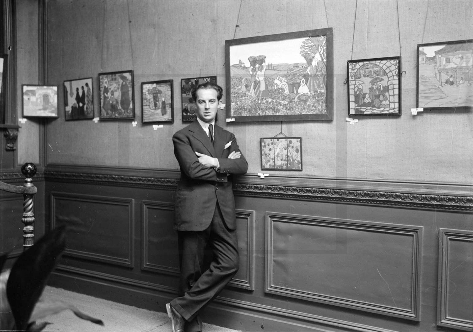 Exposição de Modesto Cadenas no Salão Bobone. Foto da EPJS Empresa Pública Jornal O Século.